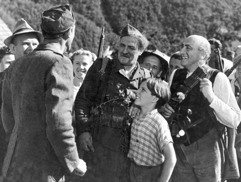 Prizor iz filma Na svoji zemlji iz leta 1948.